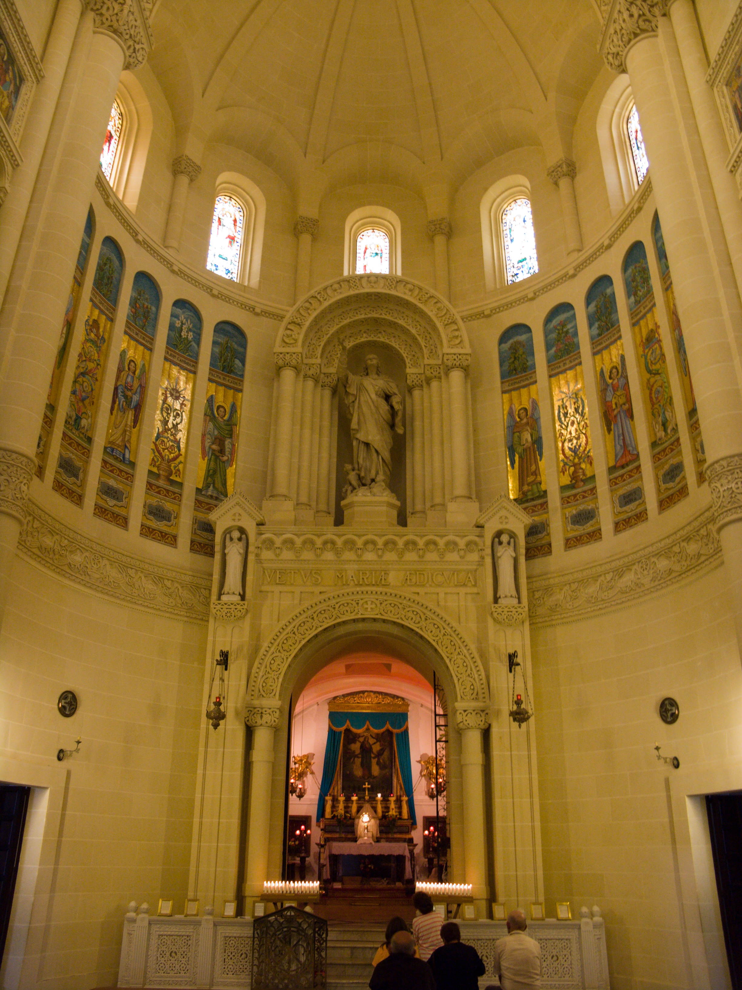 Intérieur de l'église de ta'Pinu à Malte